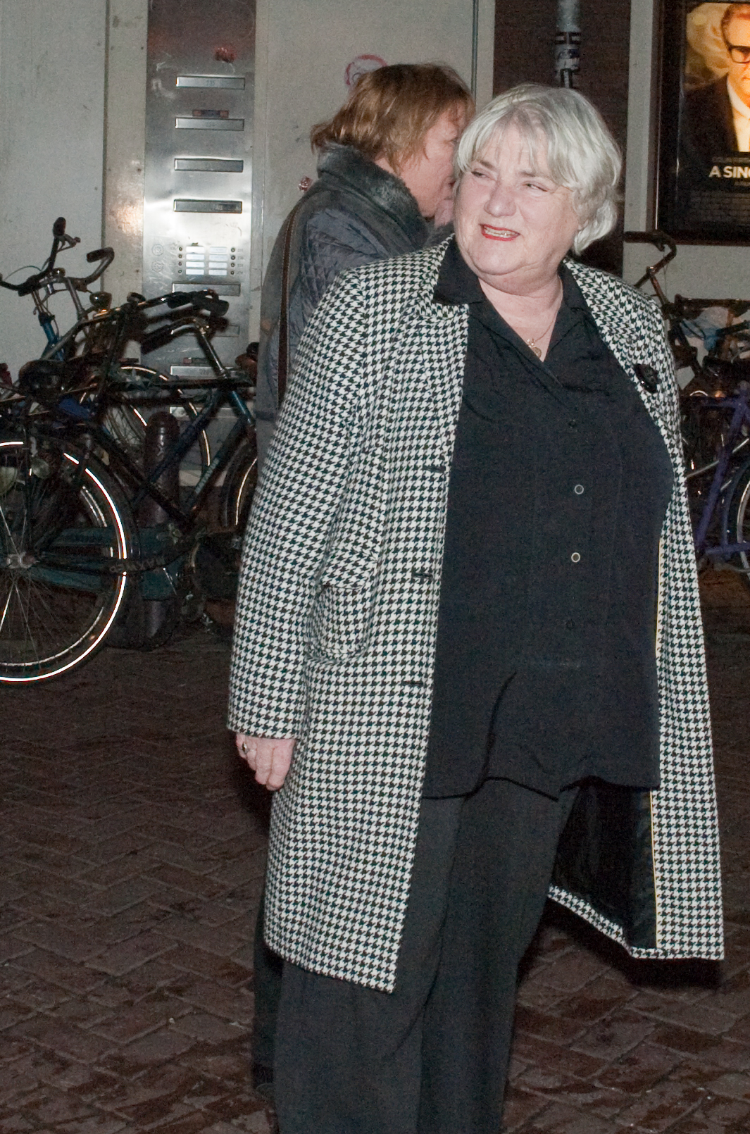 Nelly Frijda, welkom in de Amsterdamse politiek